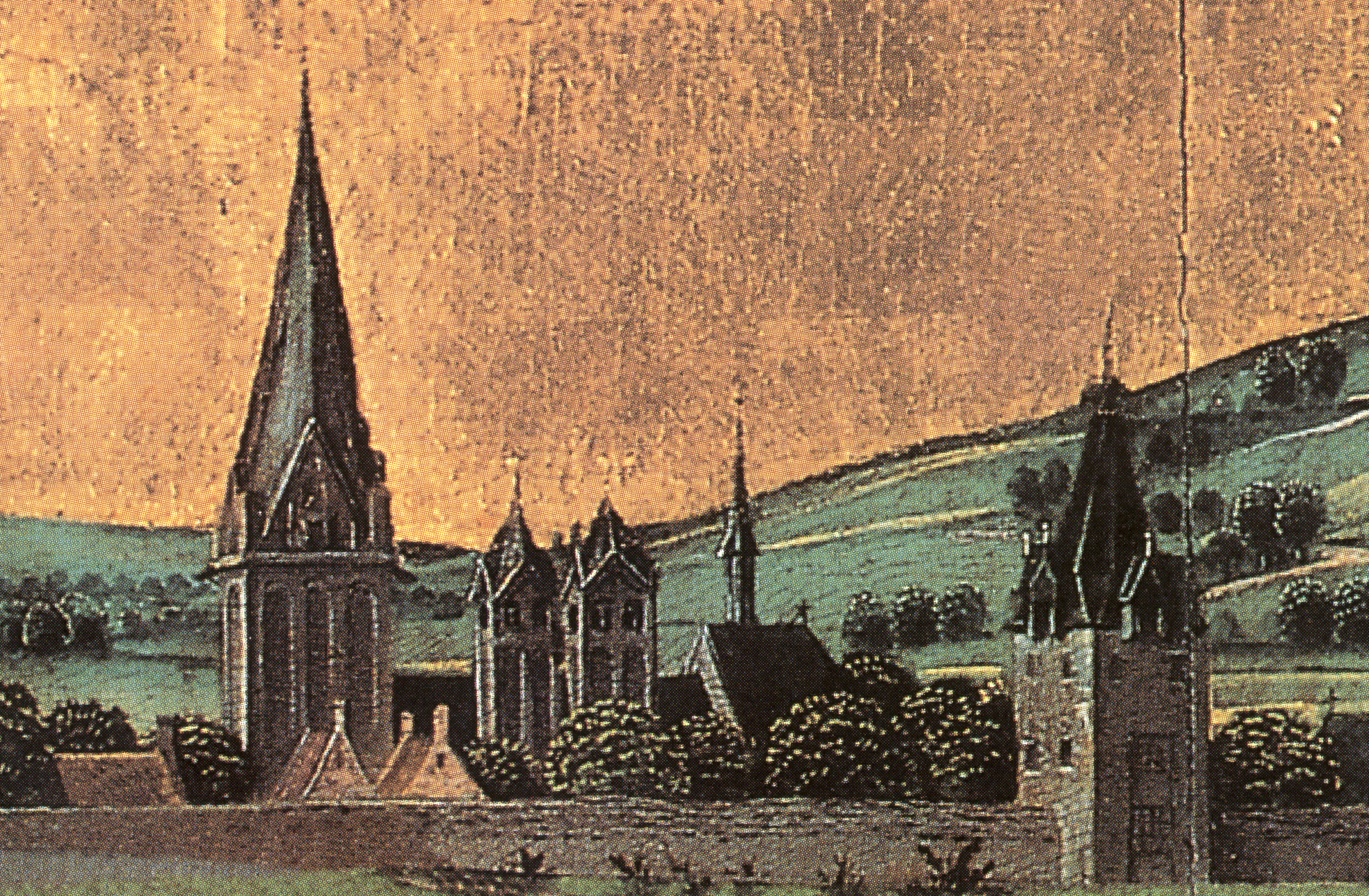 Älteste bekannte Abbildung der Stadt Dortmund vom Baegert-Altar in der Probsteikirche, hier ein Auszug mit der Marienkirche (Doppelturm) und der Reinoldikirche